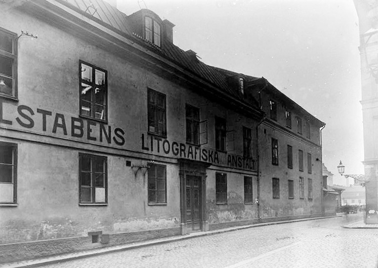 Sergelgatan 1 mot nordväst